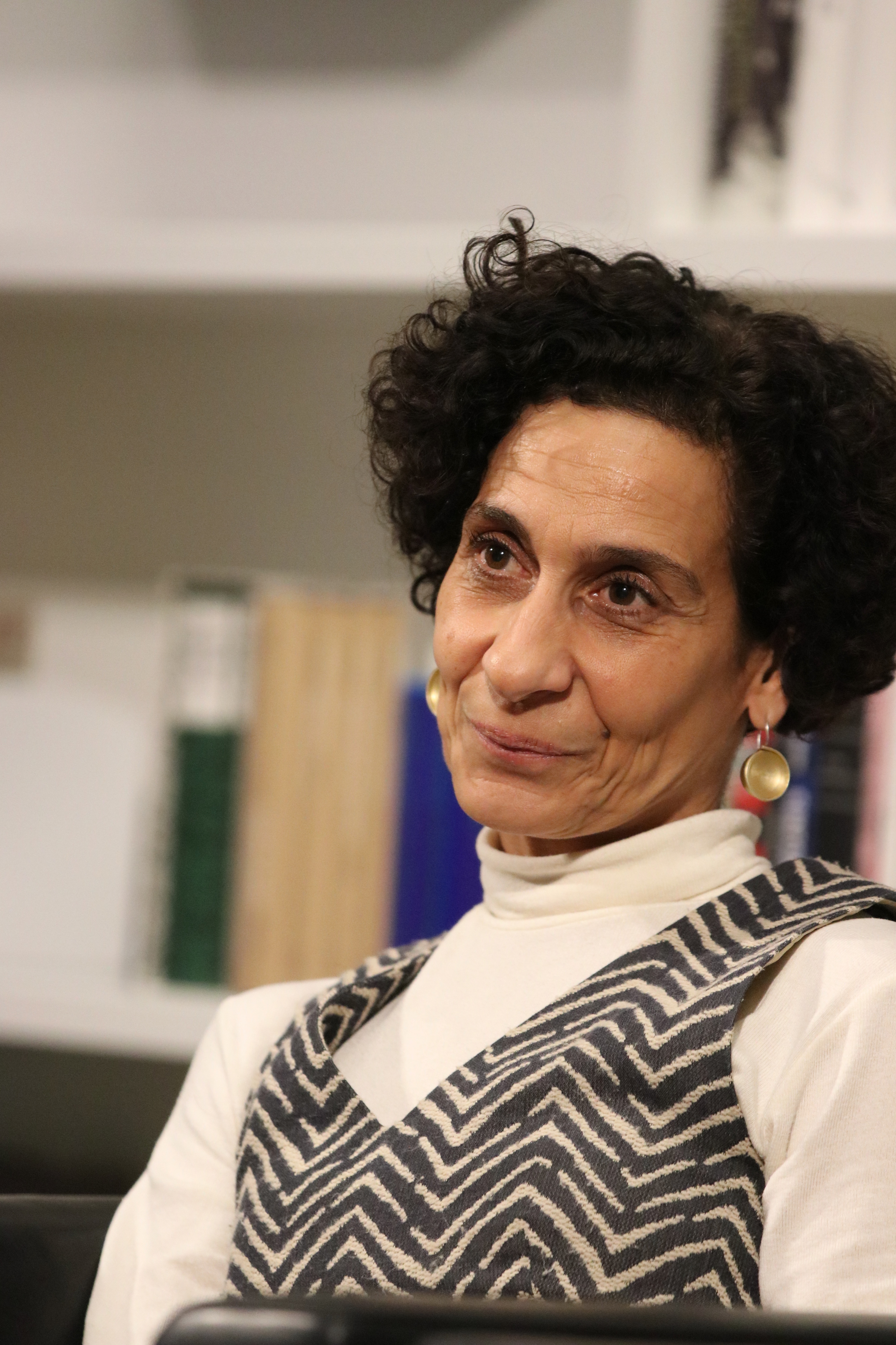 Sonja Zekri auf einer Podiumsdiskussion der Münchner Monacensia zum Thema "Anstand, Freiheit, Toleranz - Öffentliche Debatte über die Ideale der Demokratie" im Rahmenprogramm einer Ausstellung über Erika Mann.